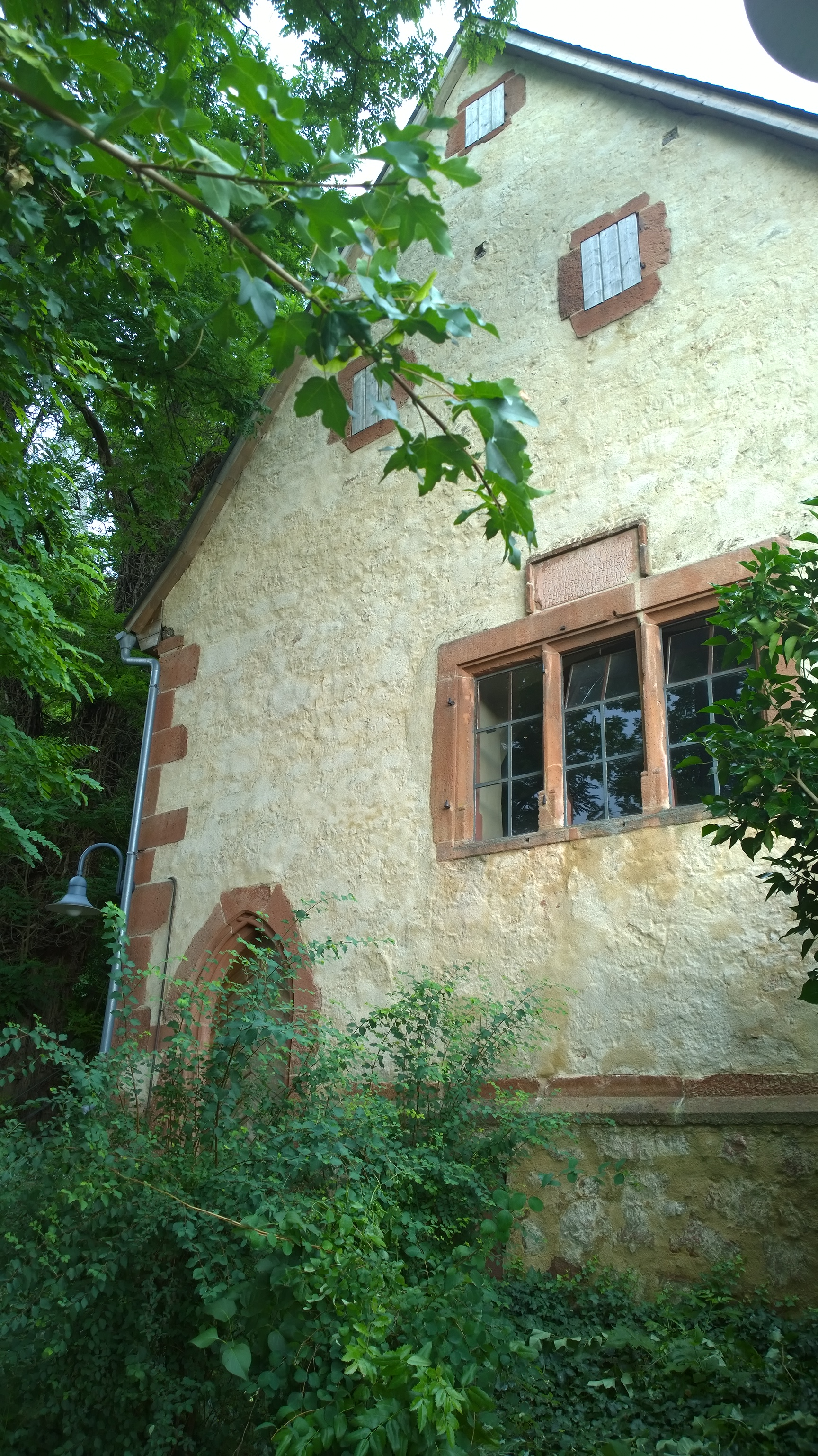 Die Südseite der mittelalterlichen Kapelle in Schaafheim (verm. ältestes Gebäude im Ort)